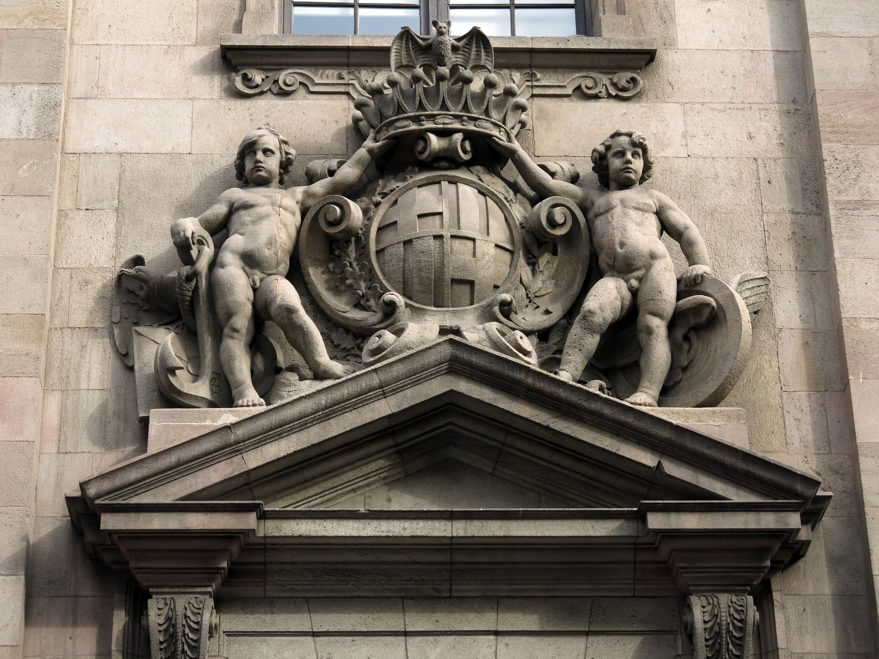 Edifici central de Correus i Telègrafs (Barcelona)